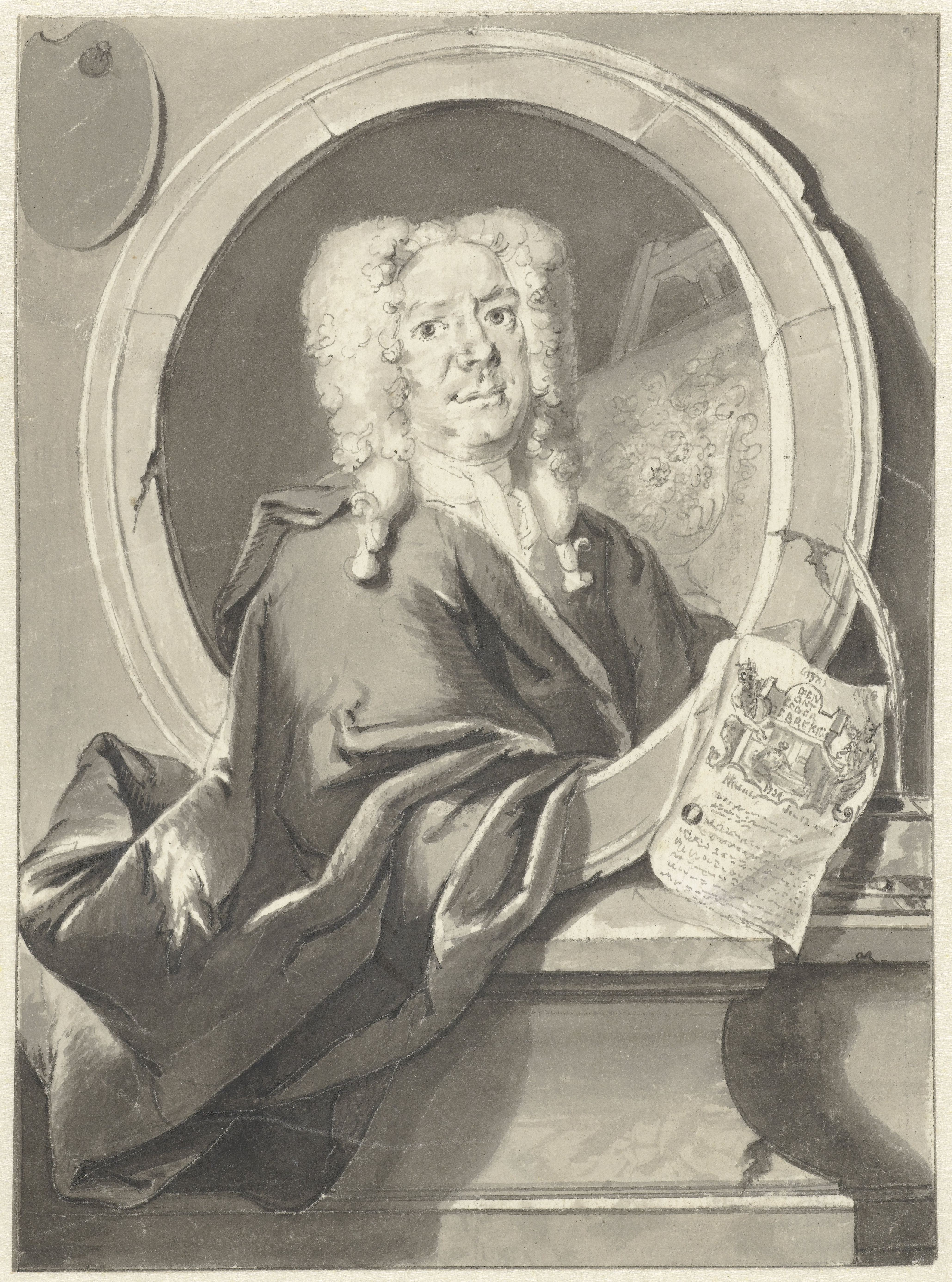 IdentificatieTitel(s): Portret van Jacob Campo Weyerman in medaillonObjecttype: tekening Objectnummer: RP-T-1894-A-3007VervaardigingVervaardiger: tekenaar: Cornelis TroostDatering: 1706 - 1750Fysieke kenmerken: pen en penseel in grijsMateriaal: papier inkt Techniek: pen / penseelAfmetingen: h 192 mm × b 142 mmToelichtingPapiertje met opschrift `Den Ont Leder de[r Ge]Breken'.OnderwerpWat: historical person (WEYERMAN, JACOB CAMPO)portrait, self-portrait of artistWie: Jacob Campo WeyermanVerwerving en rechtenVerwerving: aankoop apr-1894Copyright: Publiek domein